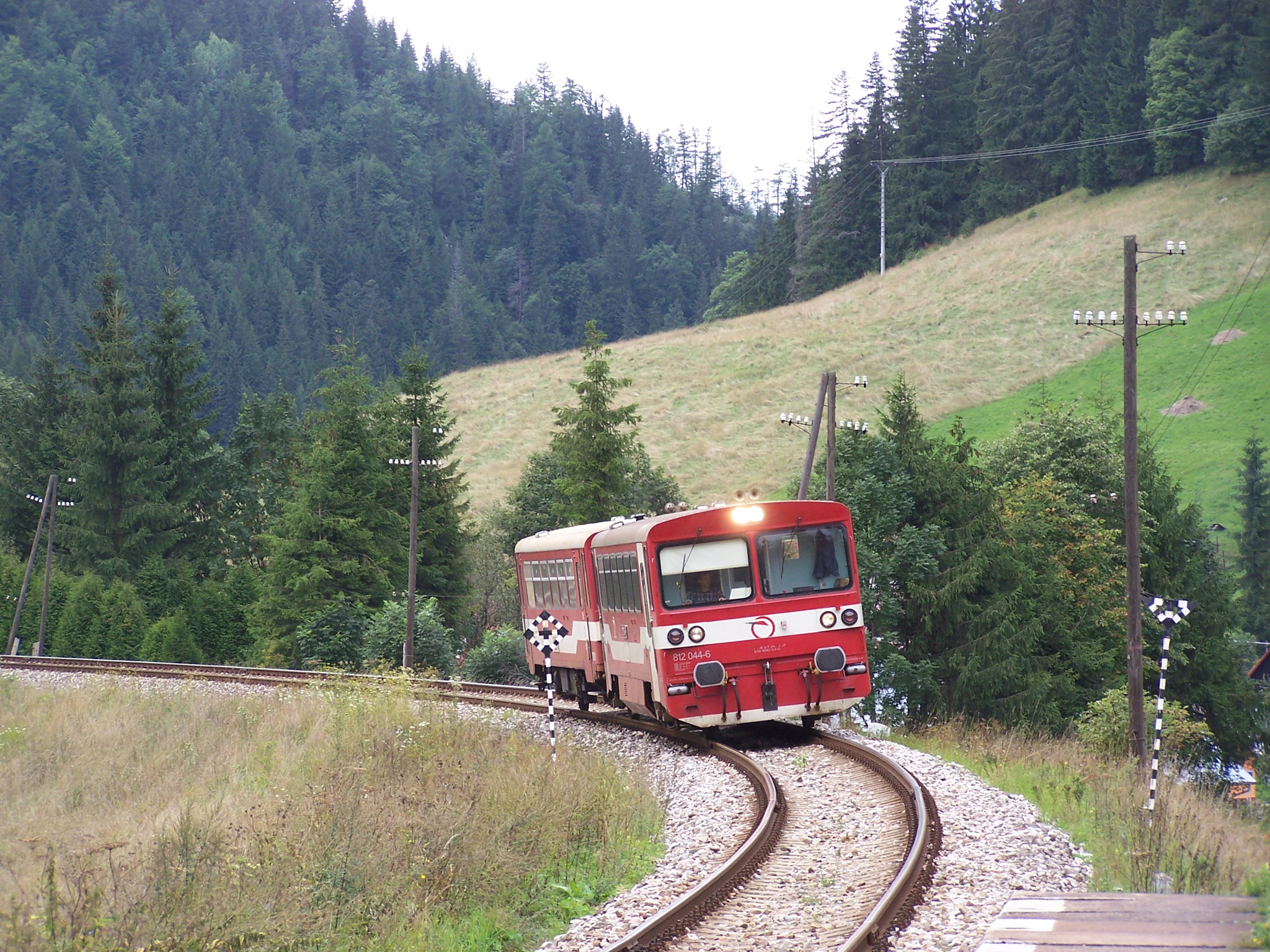 812 Sztracéna